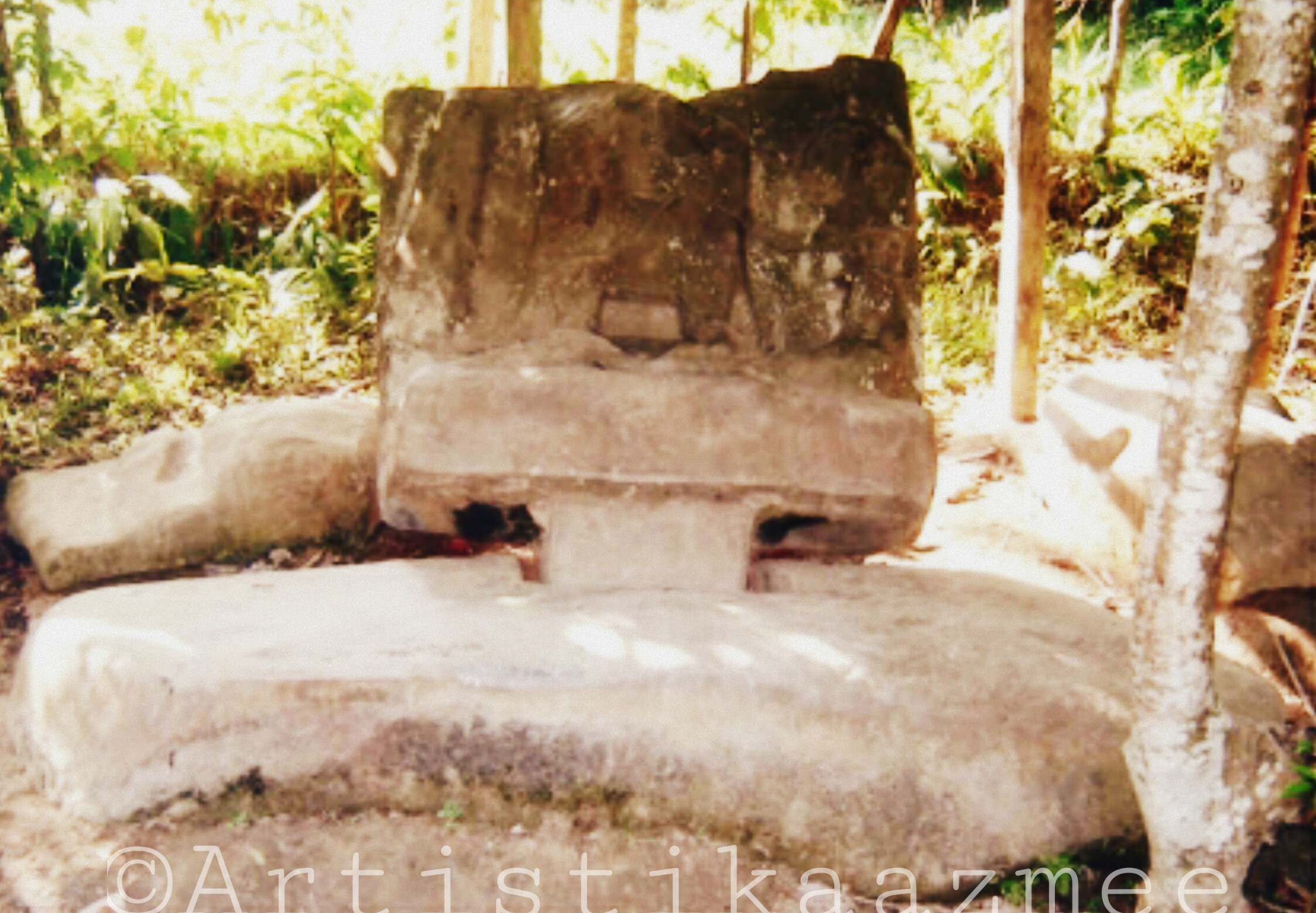 শিলুয়া ঢিবির বর্তমান চিত্র